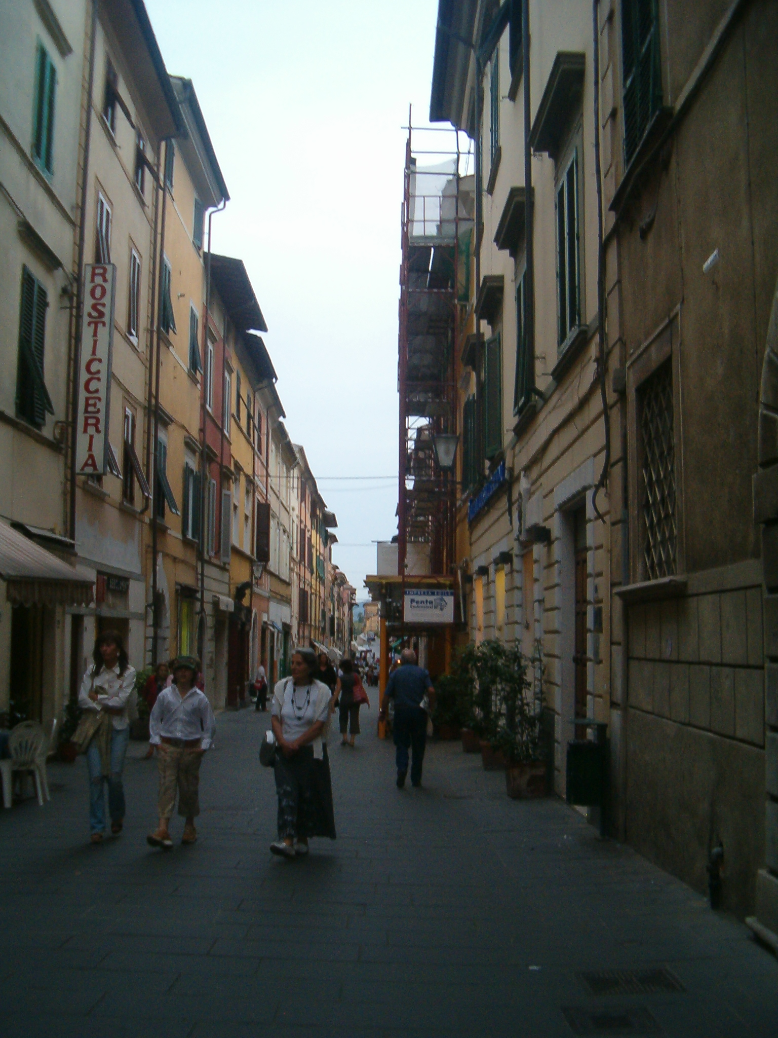 Brisckerly Opera propria Pietrasanta